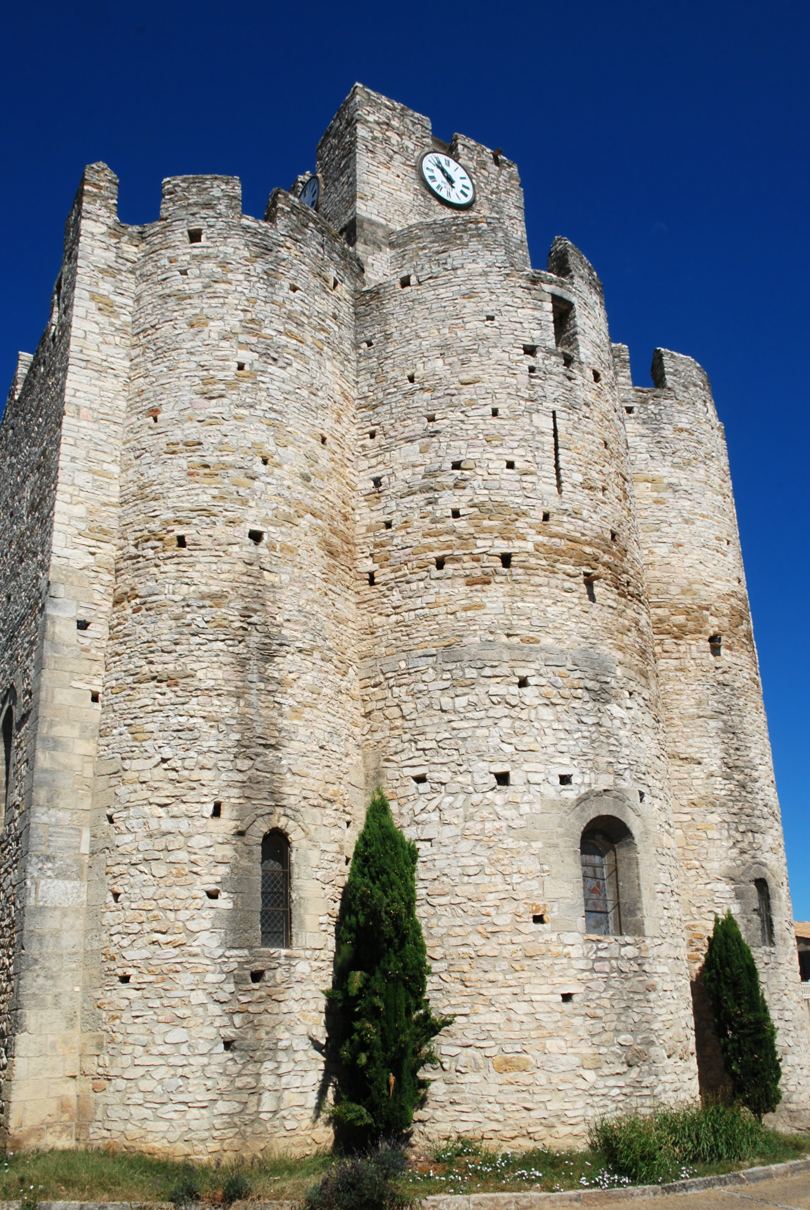 France - Gard - Église de Saint-Laurent-des-Arbres